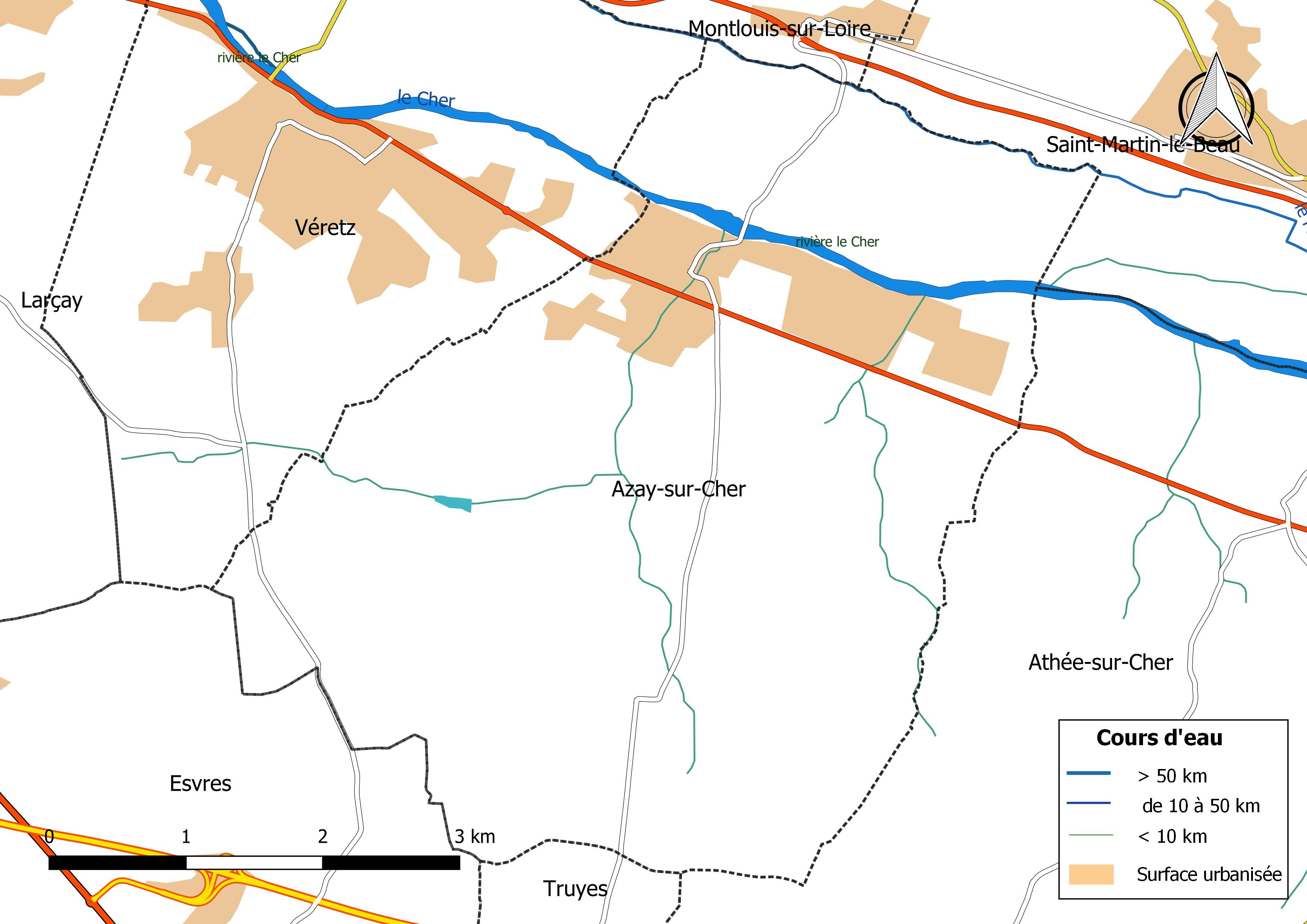 Carte du réseau hydrographique de la commune de Azay-sur-Cher (France).